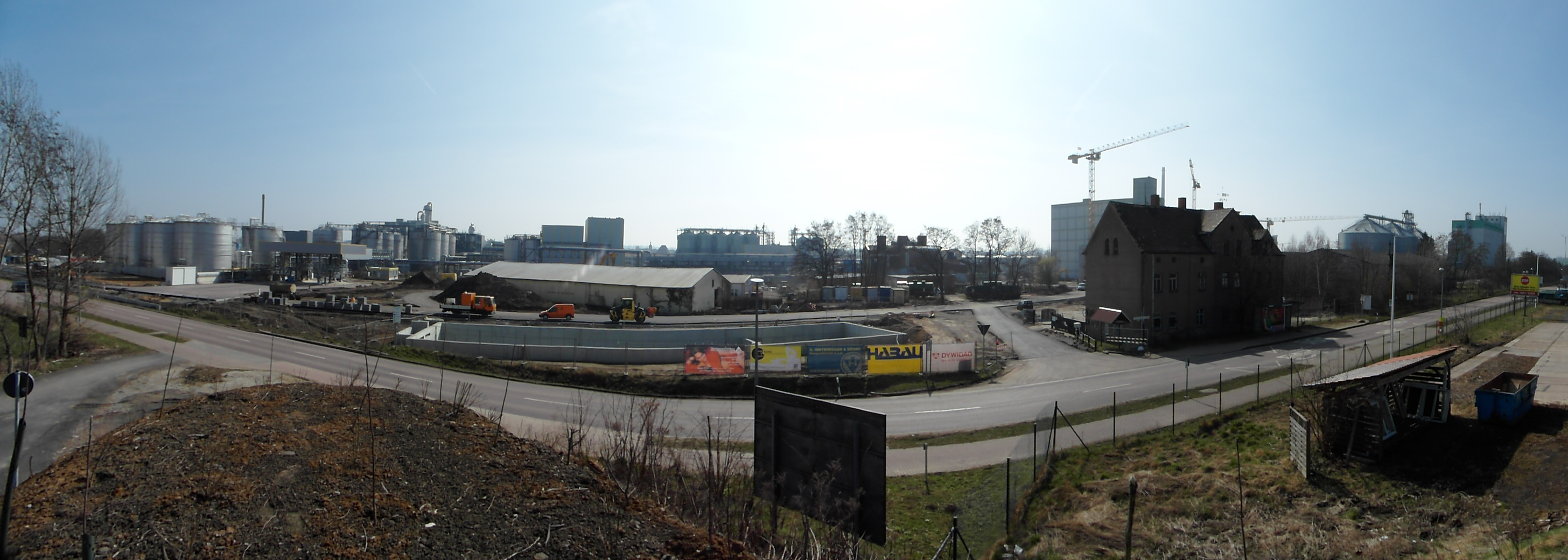 neue Bioethanolfabrik, Industriedenkmal Brikettfabrik Herrmannschacht und neue Stärkefabrik am Beginn des Radweges Zeitz-Camburg